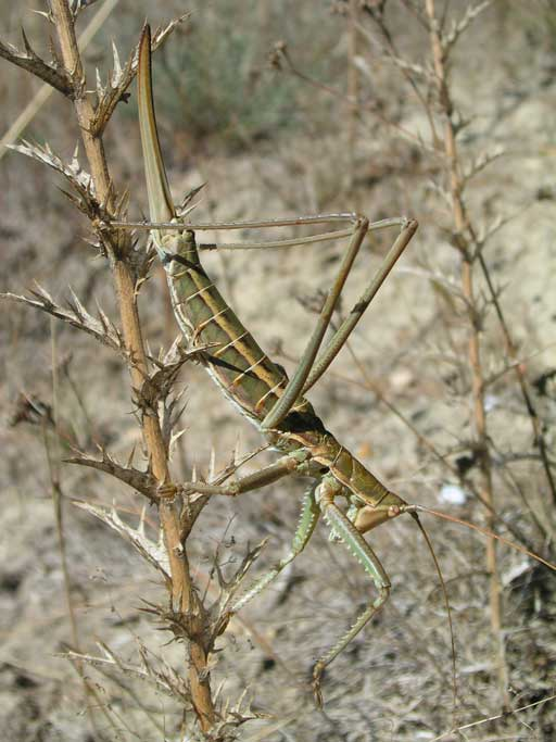 Saga pedo (Pallas, 1771) la Magicienne dentelée (Hexapoda, Orthoptera, Tettigoniidae, Saginae) Auteur : Christophe BERNIER Localisation : EYRAGUES (France-13), Les Pié-Vins Date : le 26 septembre 2004